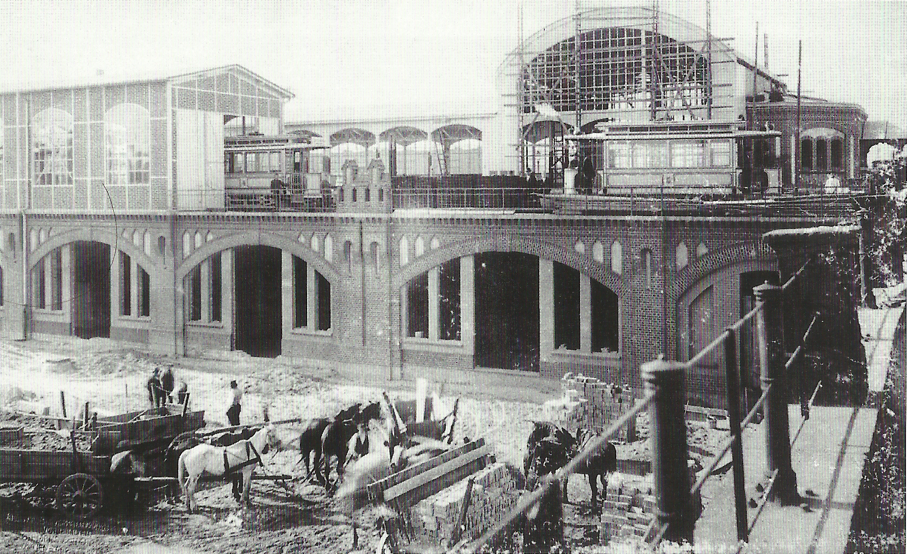 Der im Bau befindliche Berliner U-Bahnhof Warschauer Brücke, davor die Wagenhalle der anschließenden Flachbahn der Hochbahngesellschaft